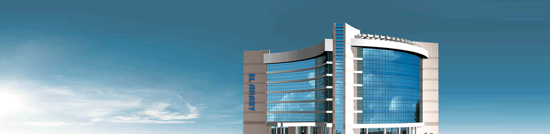 العربى جروب للتجارة وصناعة